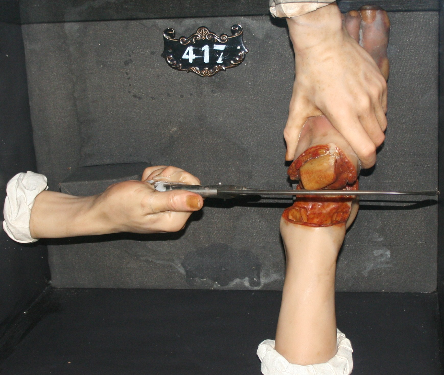 Cire anatomique représentant une amputation